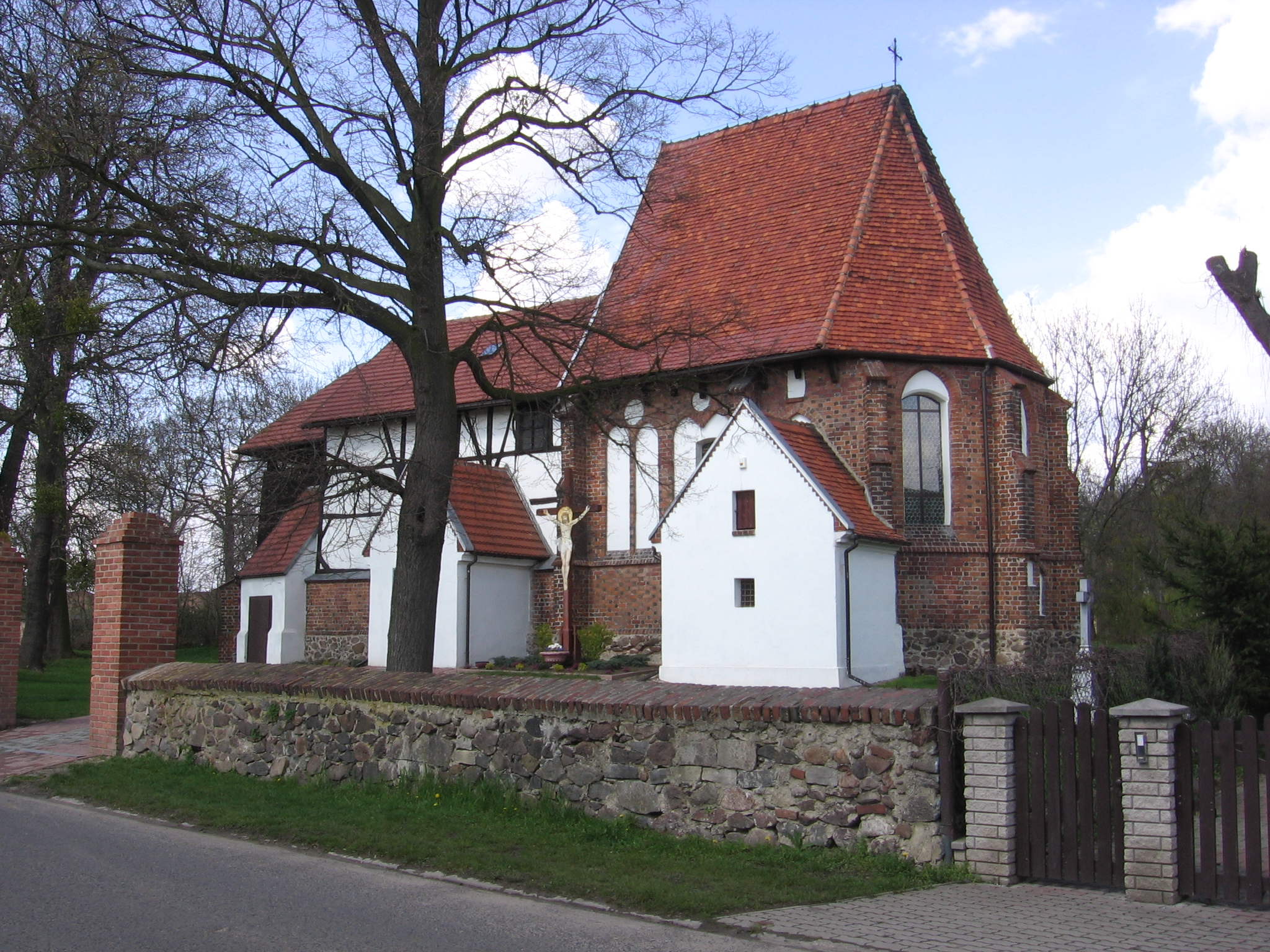 Kościół filialny p.w. Matki Boskiej Różańcowej w Brzezinie (zabytek nr rejestr. A/1153/1650)